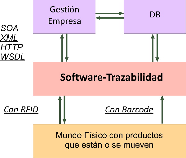 Capas de la arquitectura moderna de un software de trazabilidad